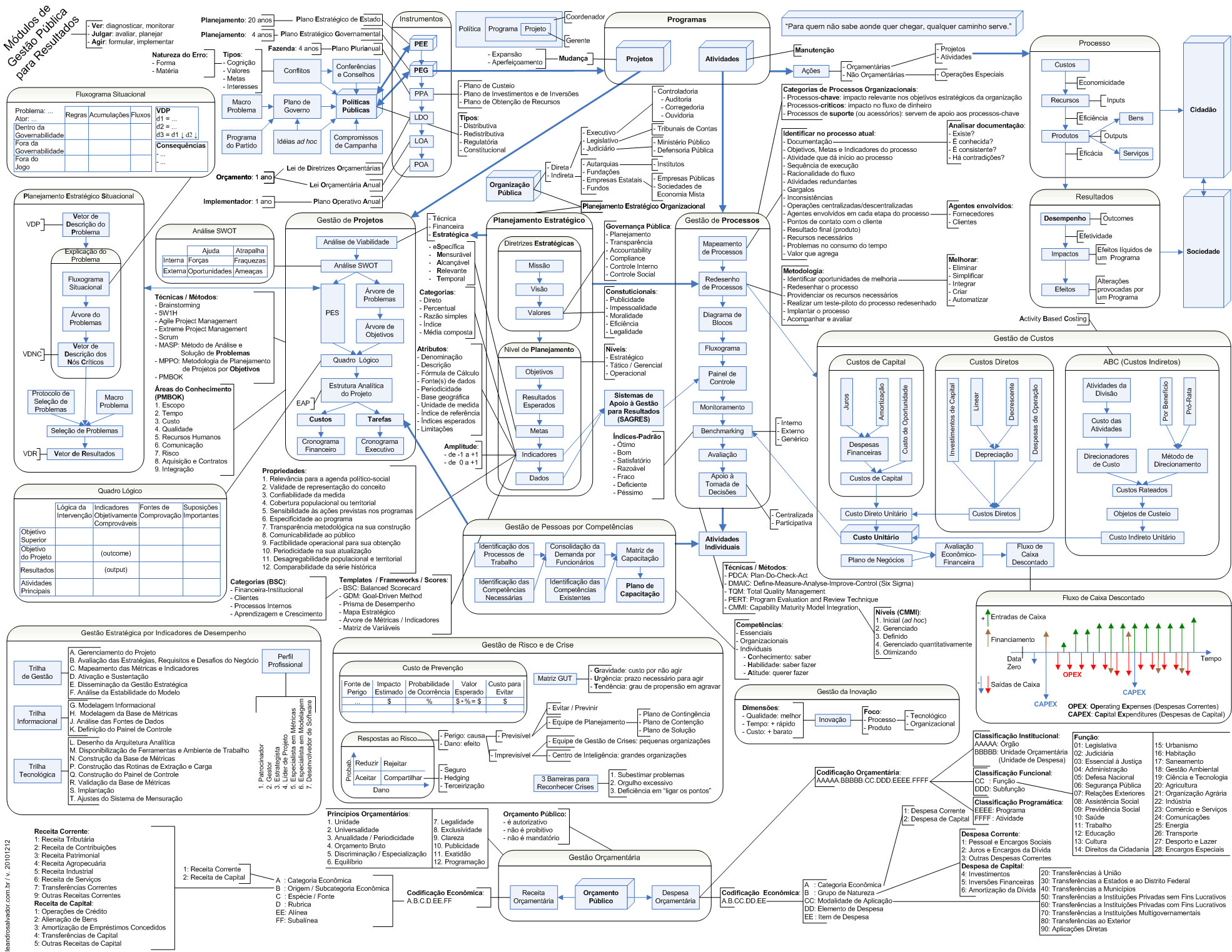 Um Mapa da Gestão de Programas Públicos, incluindo: Gestão de Projetos, Gestão de Processos, Gestão de Pessoas por Processos, Gestão Orçamentária, Planejamento Estratégico Situacional (PES), Gestão de Custos, Activity Based Costing (ABC), Índices-Padrão.